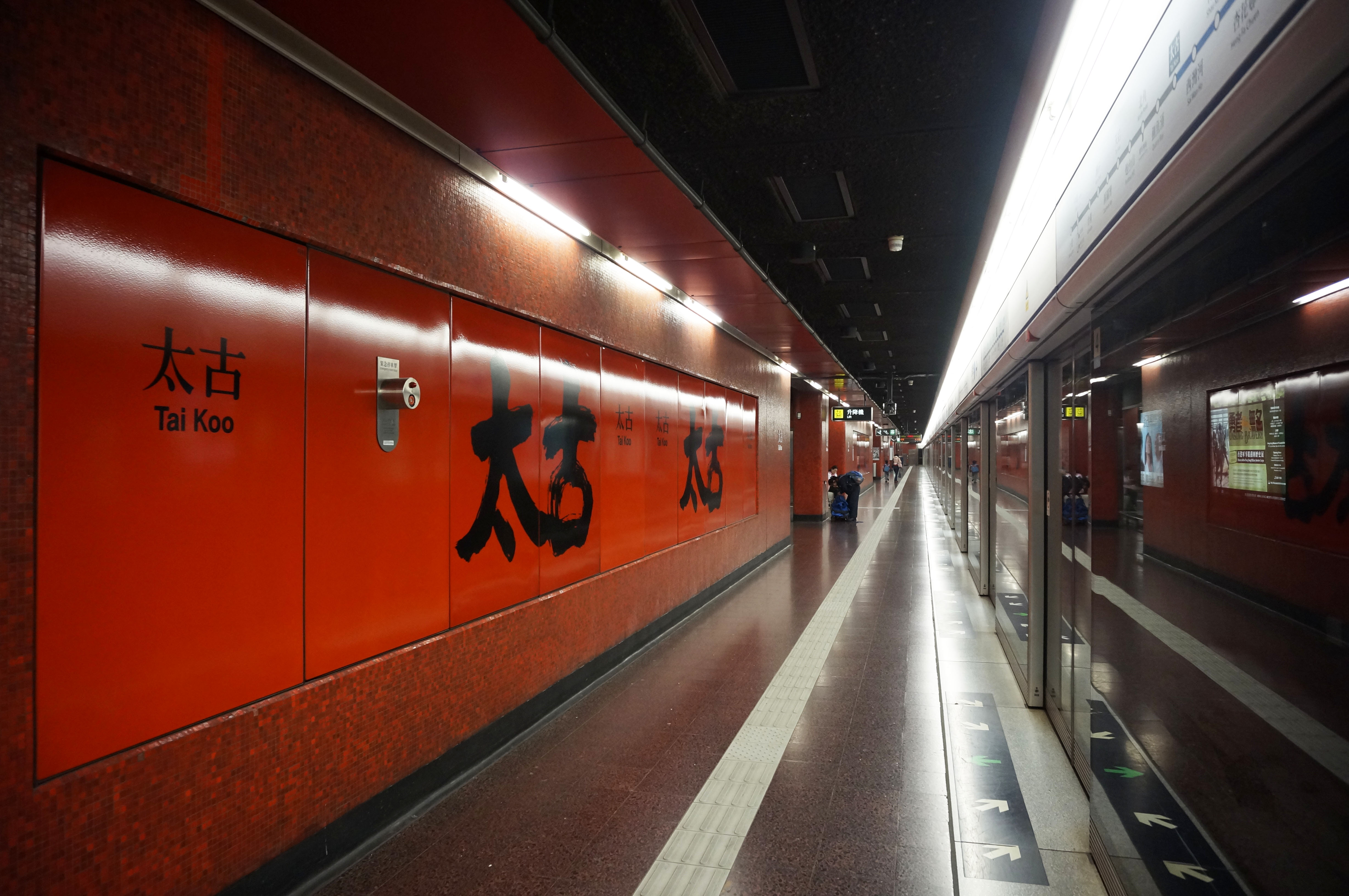 港鐵太古站月台